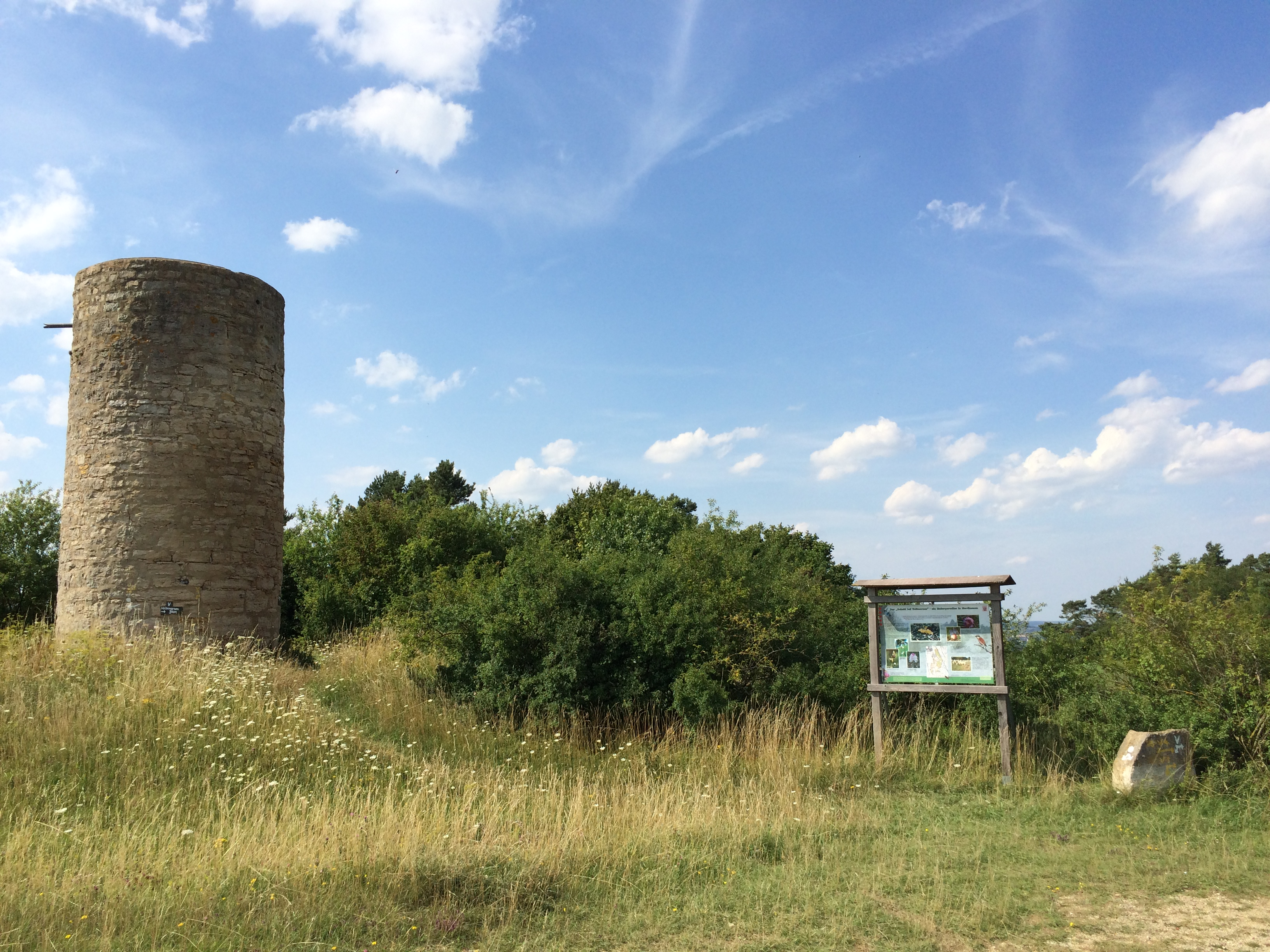 Die Scheidwarte im NSG „Scheid bei Volkmarsen“, südlich von Volkmarsen